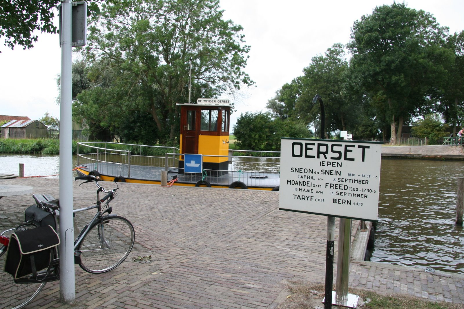 Veerpont Wyns (Wijns)